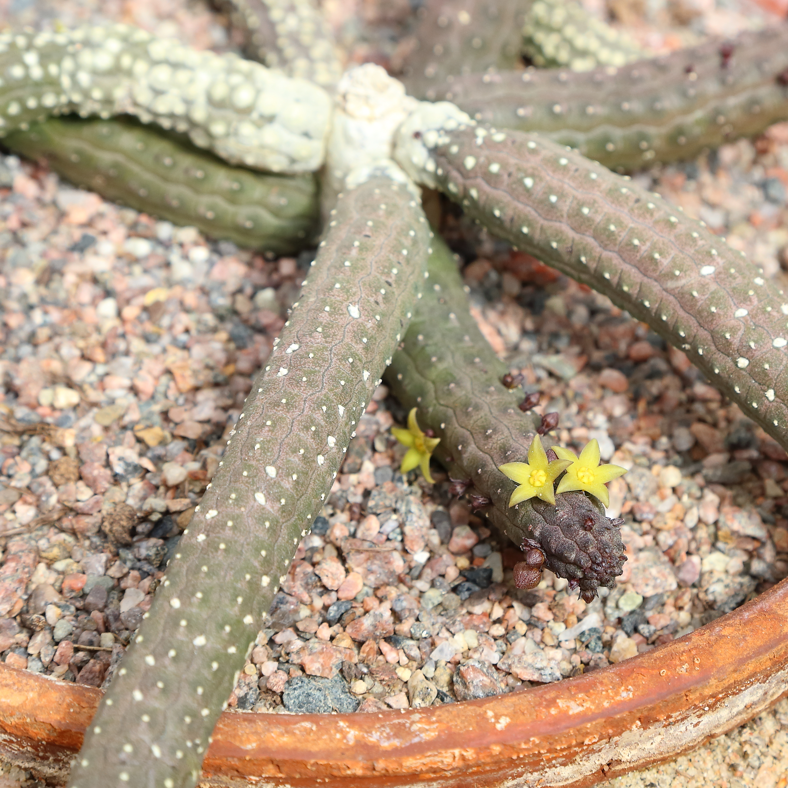 Echidnopsis cereiformis identifierad med hjälp av skylt i Göteborgs botaniska trädgård.